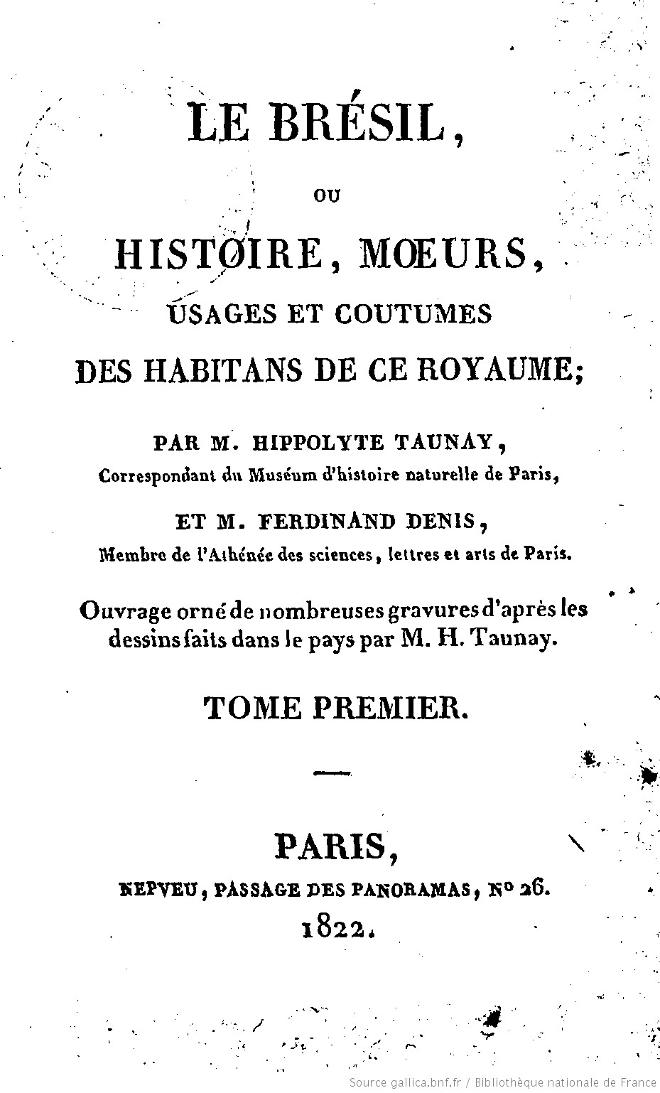 Le Brésil, ou Histoire, moeurs, usages et coutumes des habitans de ce royaume Hippolyte Taunay et Ferdinand Denis